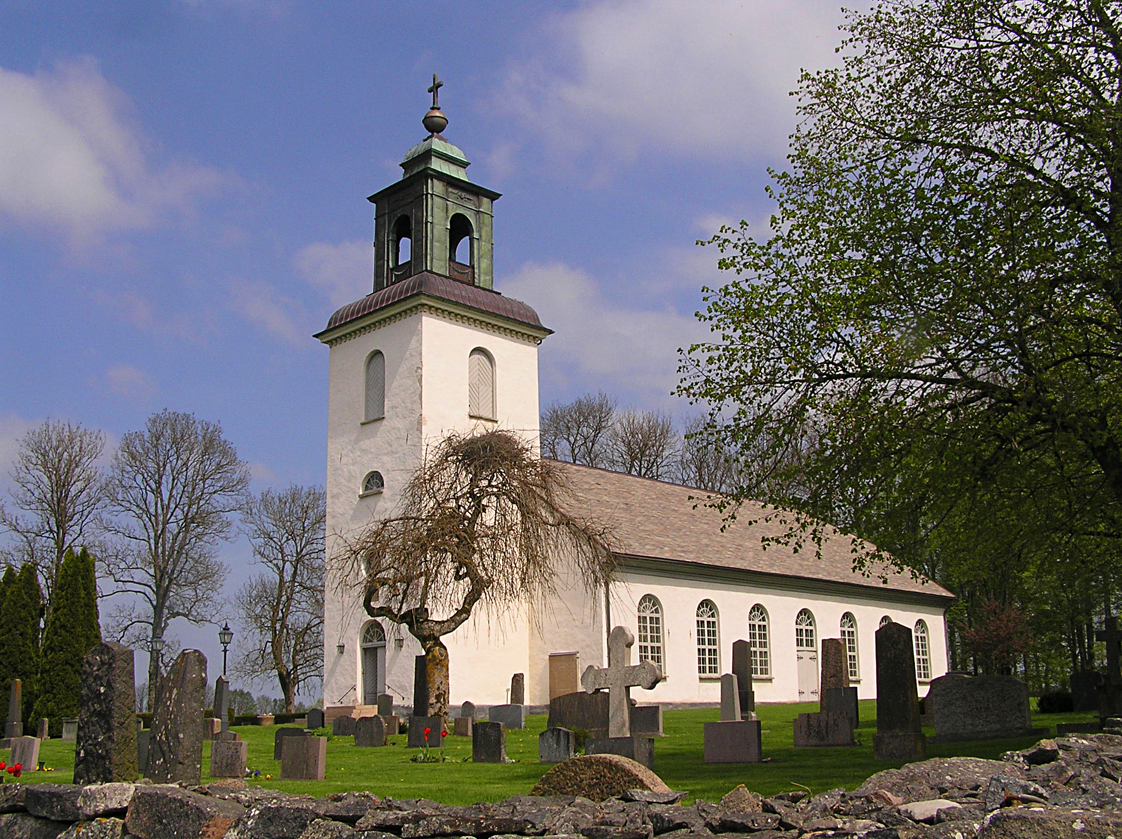 Särestad-Bjärby kyrka i Västergötland.